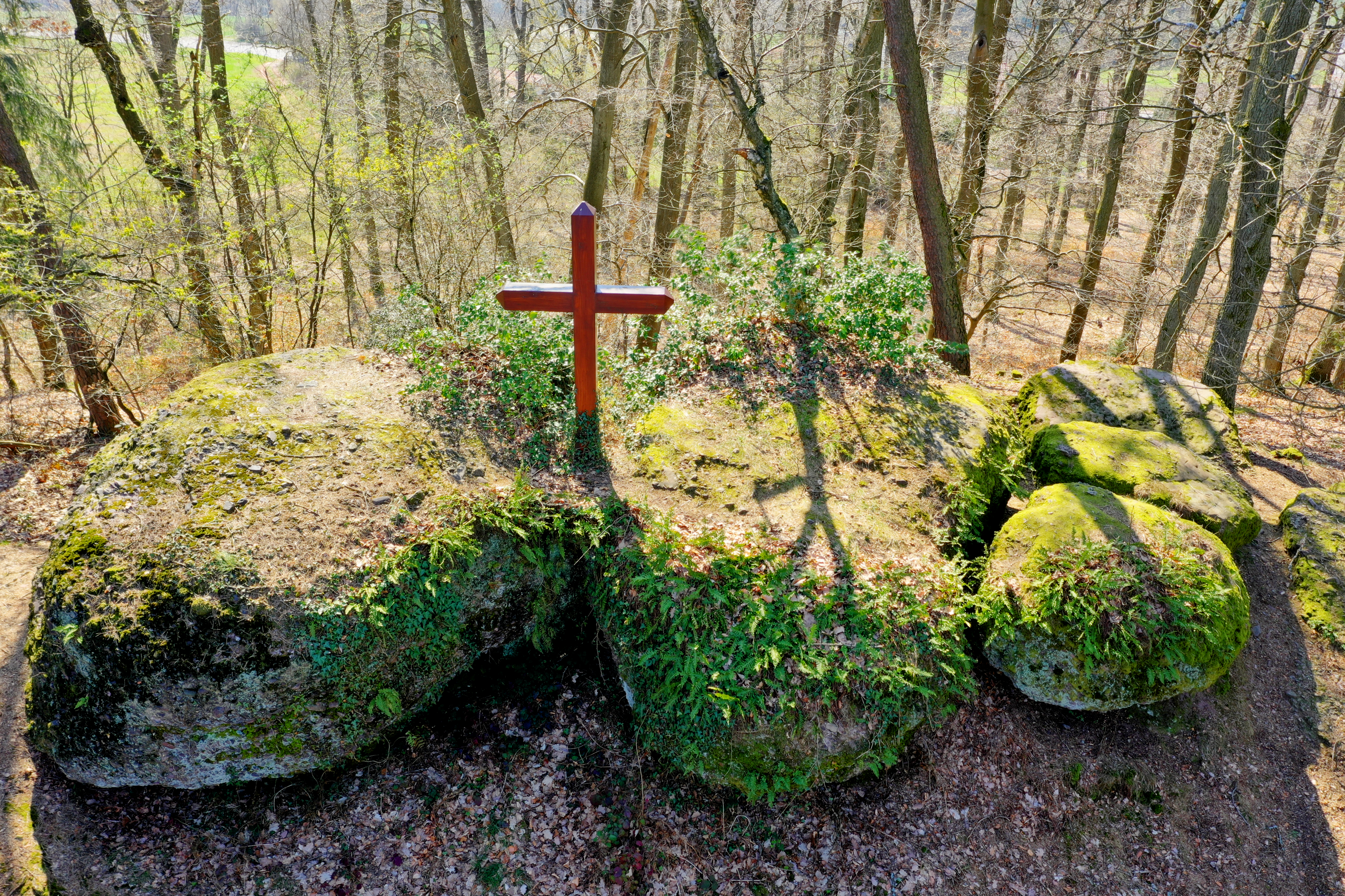 Felsblöcke aus verkieseltem, rotliegendem Konglomerat. Seit 1930 mit Kreuz, eingemeißelten Nischen mit Mutter Gottes, Kreuzweg. Neben dem Begriff Kallenstein auch Kaltenstein oder Keltenstein verwendet.